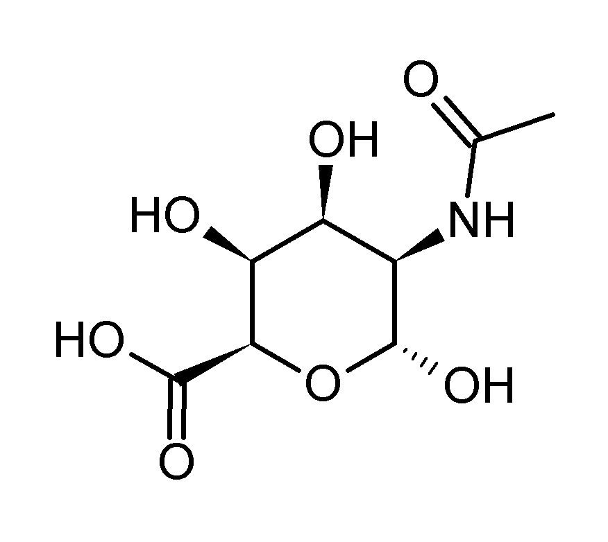 N-Acetyltalosaminuronic acid